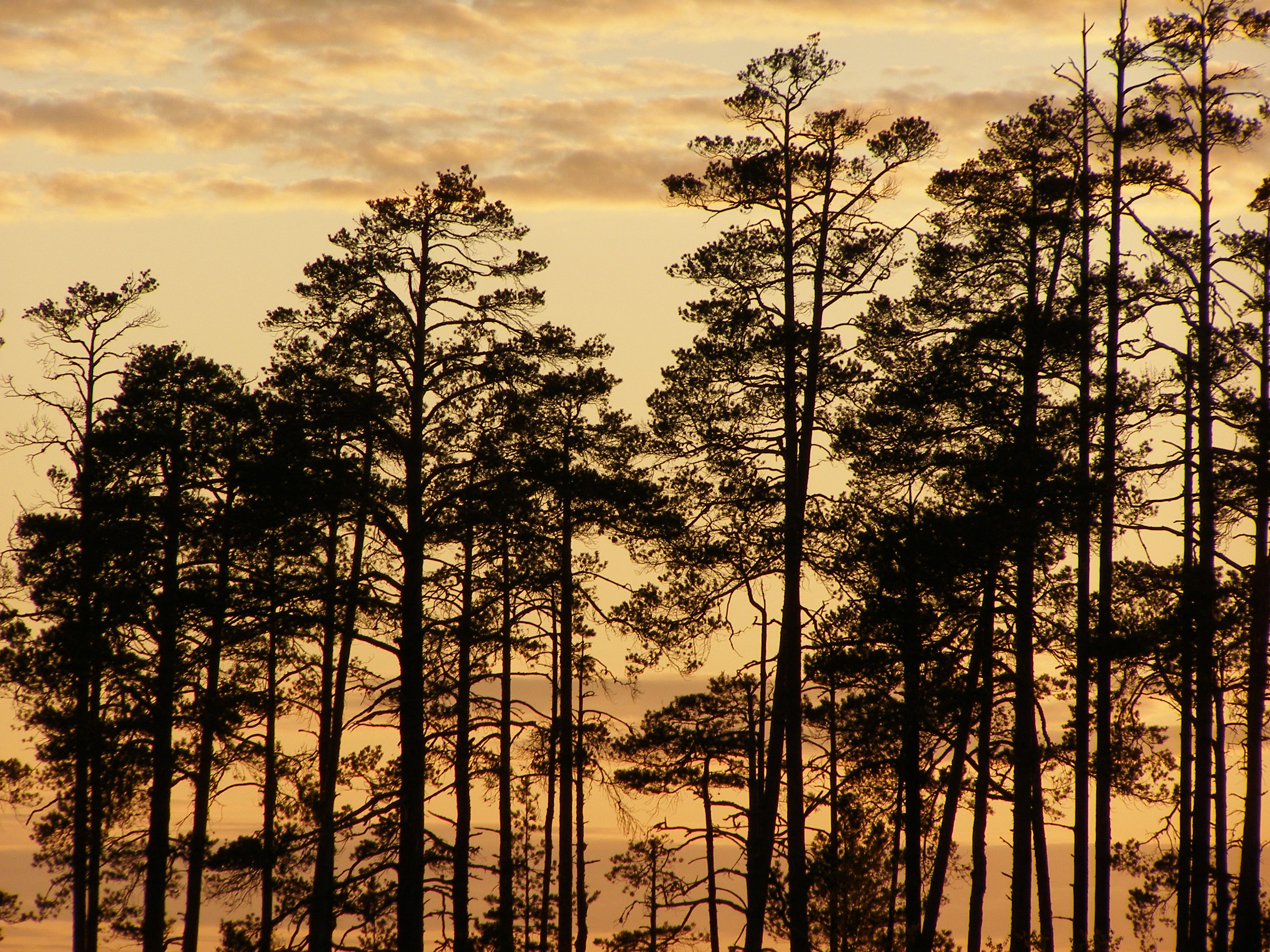 Männid Sirtsi soos